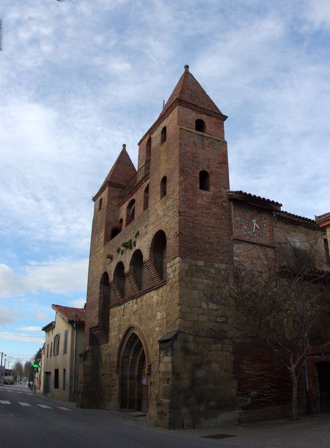 Église Saint-Barthélemy du Fossat, (Inscrit, 1926)